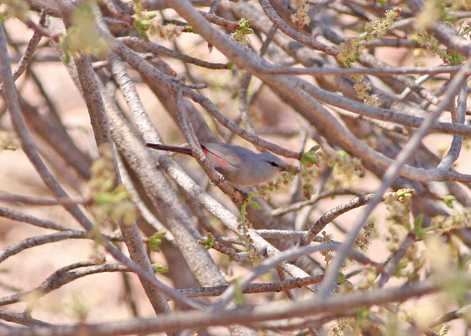 Hobatere to Kunene River